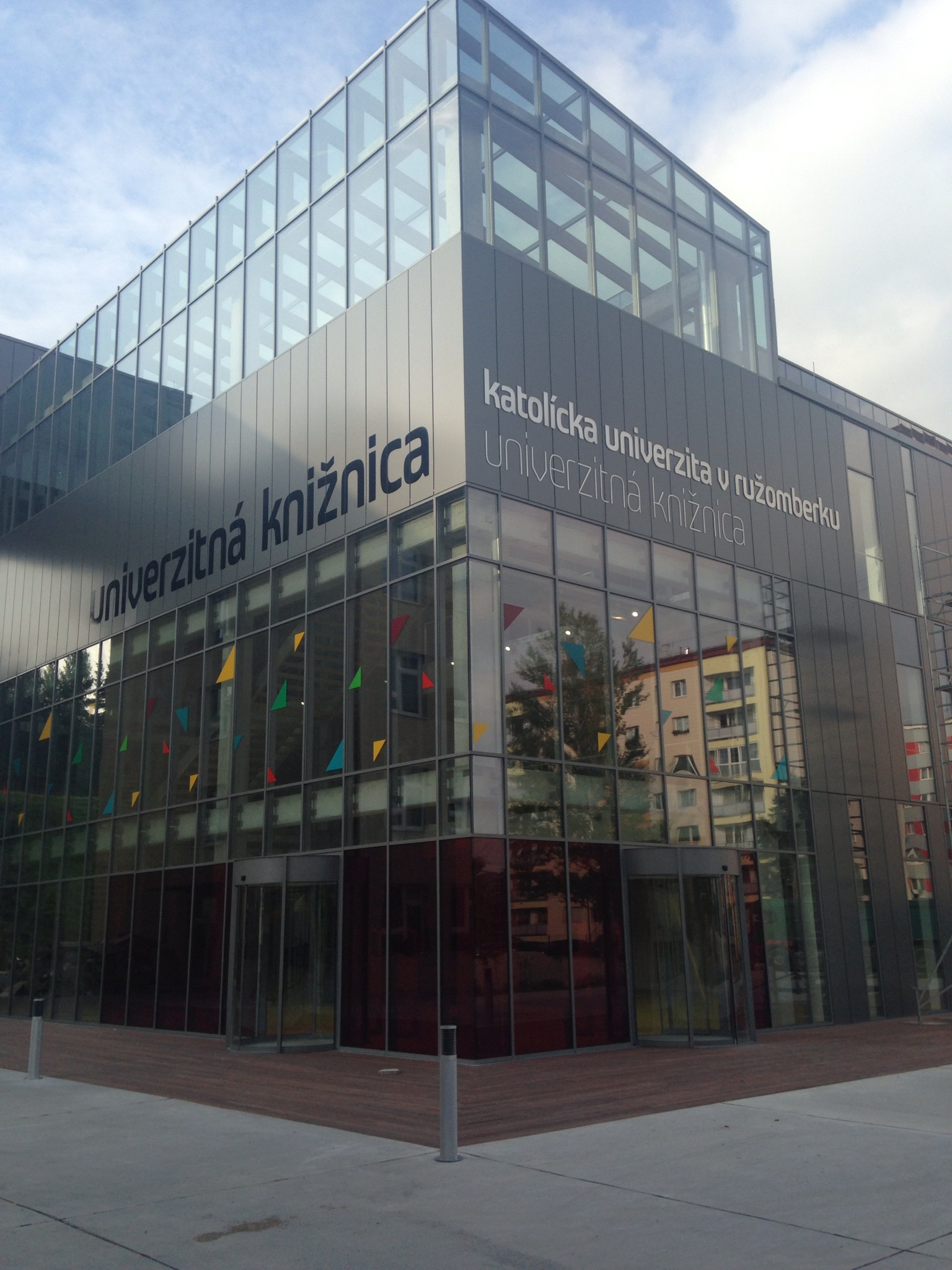 Katolícka univerzita v Ružomberku, sídlo rektorátu a univerzitnej knižice